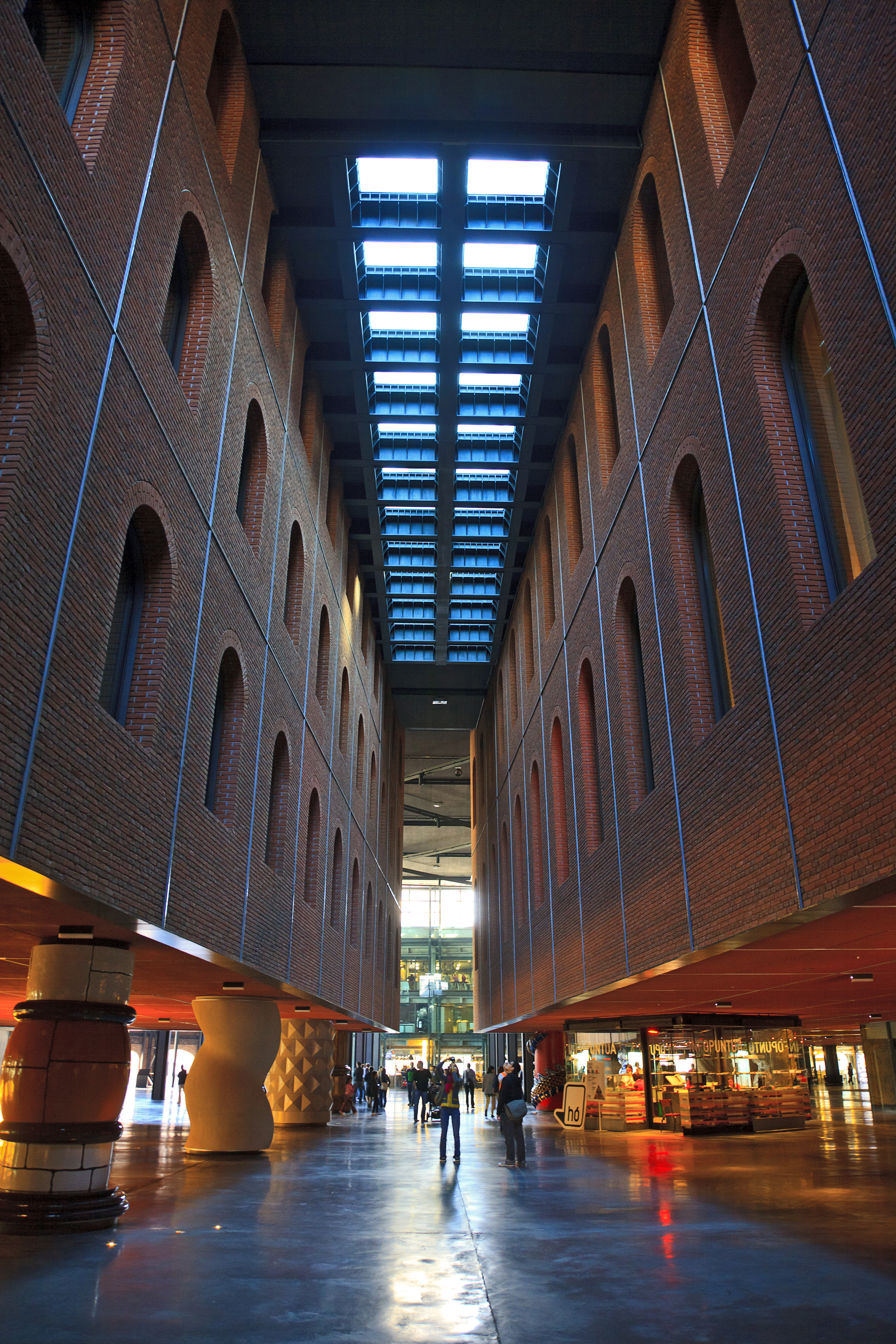 La Alhóndiga. Bilbao. Vizcaya. País Vasco. Spain